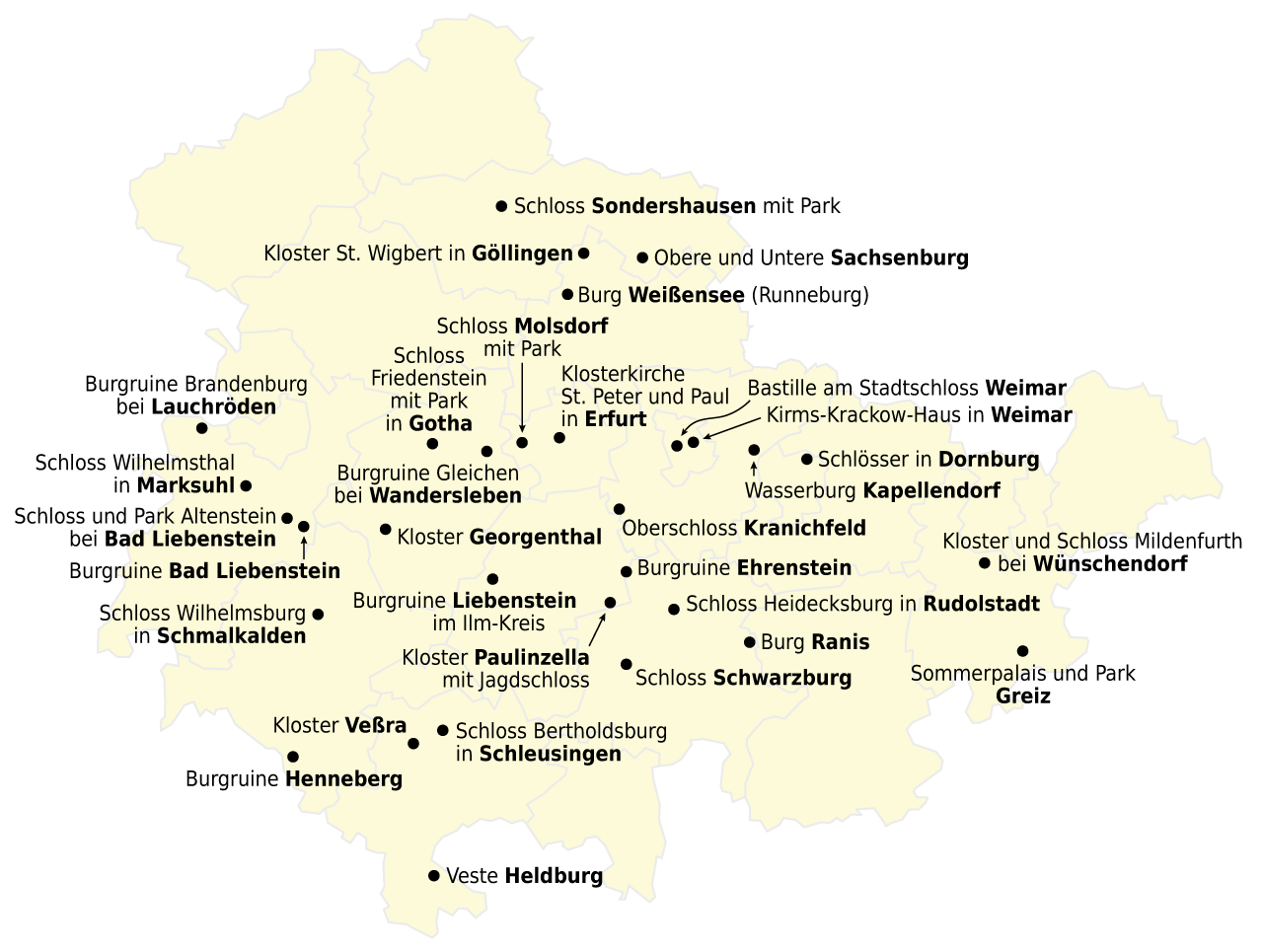 Karte der verwalteten Liegenschaften der Stiftung Thüringer Schlösser und Gärten